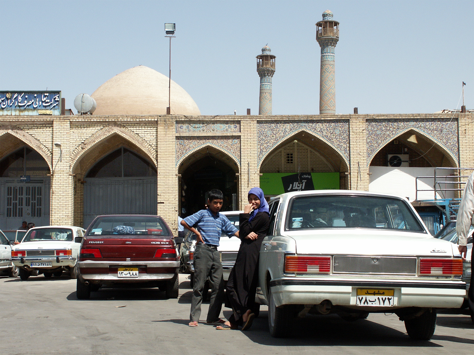 hanging out